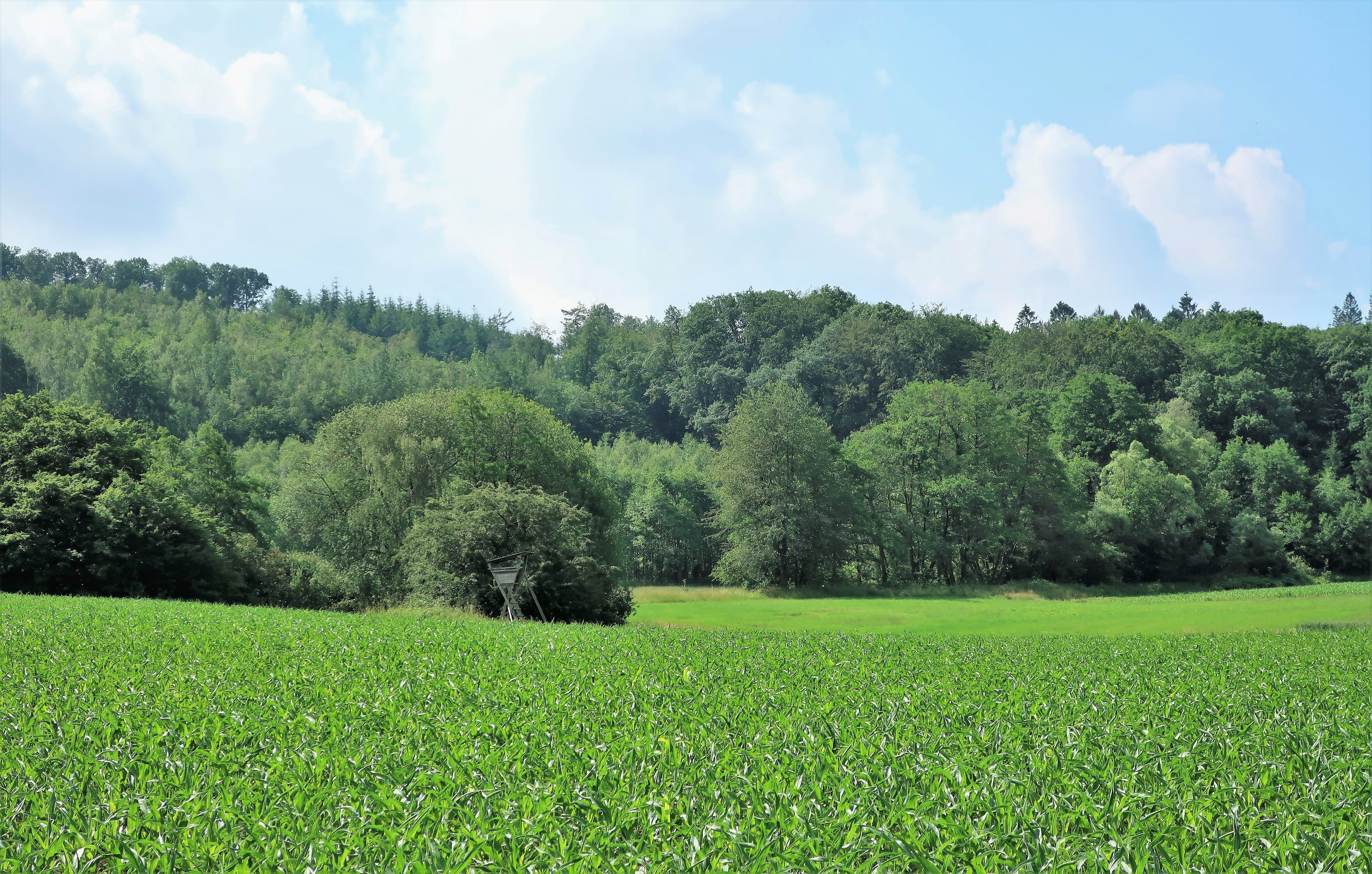 Geschützter Landschaftsbestandteil 1.4.2.60 „Bachschwinde mit Doline Brauckstück“ in Hagen, südwestlich von Holthausen. Es handelt sich um einen Bachlauf von der Quelle bis zur Bachschwinde in einer teilweise mit Abfall verfüllten Doline des Massenkalkes. Die Quellzonen und der Oberlauf des Baches liegen in einem zum Teil naturnahen Laubmischwald, im weiteren Verlauf stehen bachbegleitende Gehölze. Der untere Bachabschnitt wurde verlegt und begradigt.